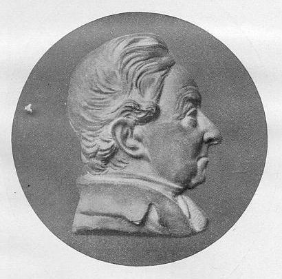 Jean François Boissonade de Fontarabie (1774–1857), französischer Altphilologe. Medaillon von David d’Angers aus dem Besitz von John Edwin Sandys, Cambridge University Press.